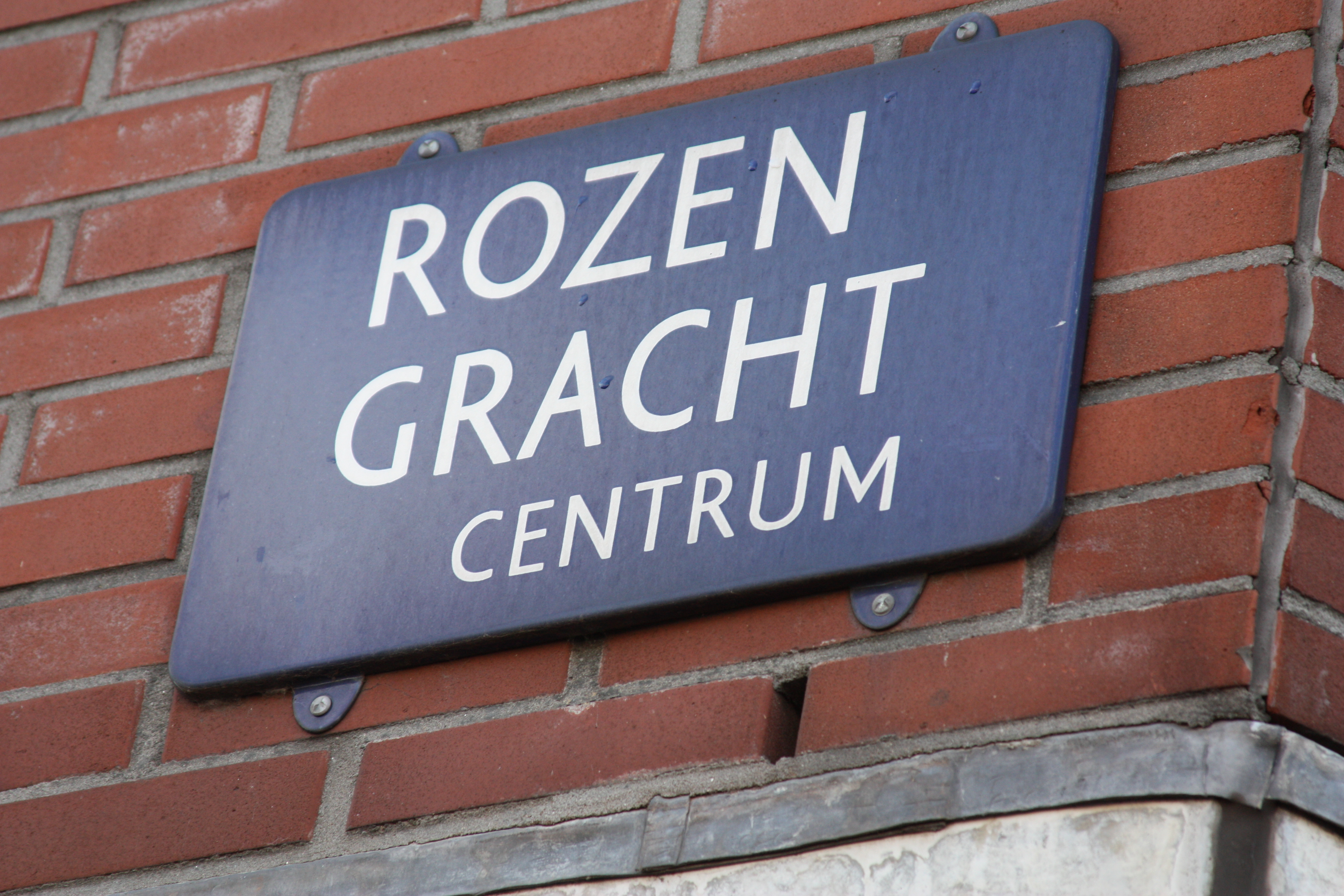 Amsterdam Zentrum